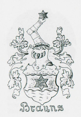 Wappen des Ratzeburger Amtmannes Gottlieb Johann August Brauns 1820